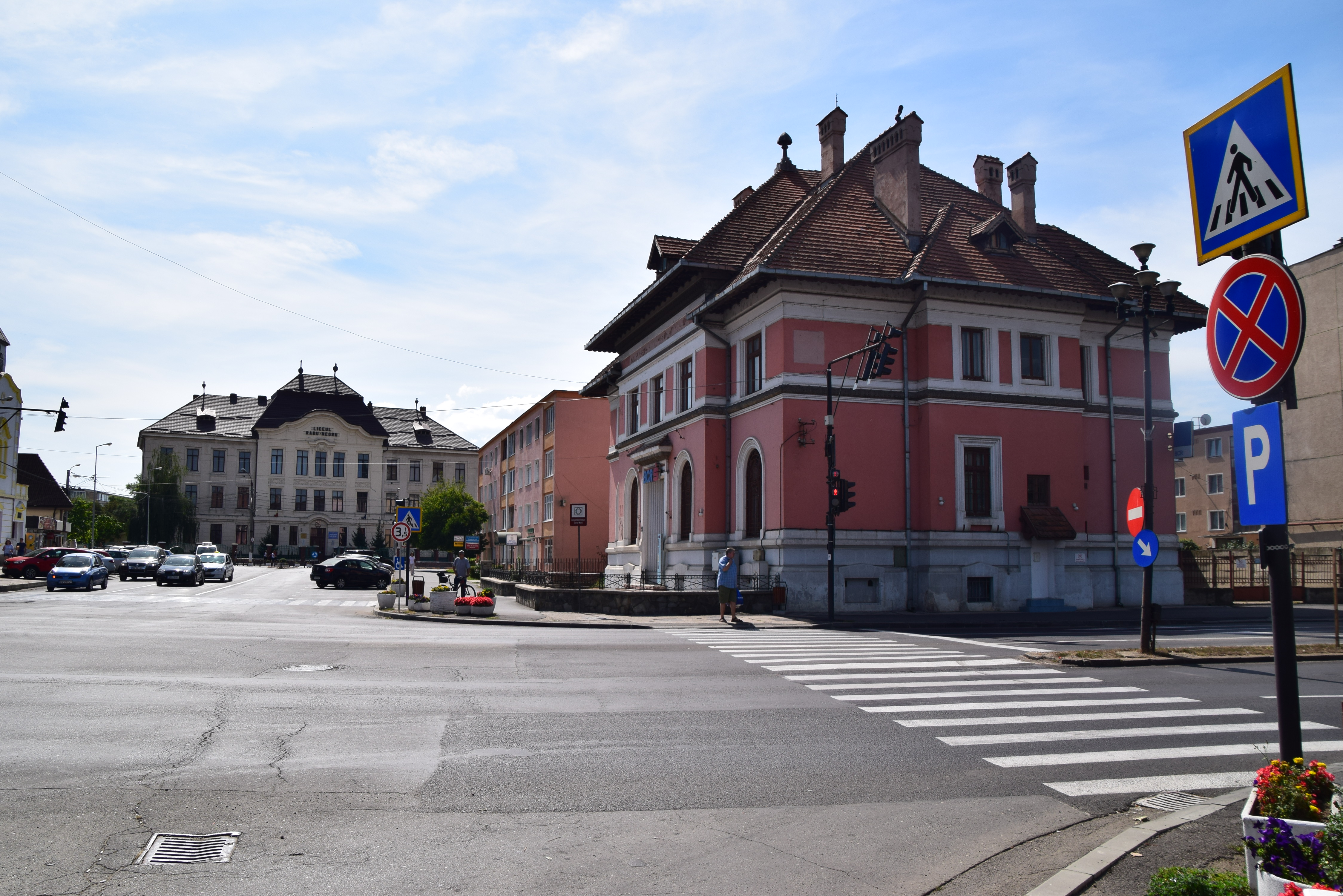 Ansamblul urban „Zona Morii” în dreptul străzii Mihai Eminescu